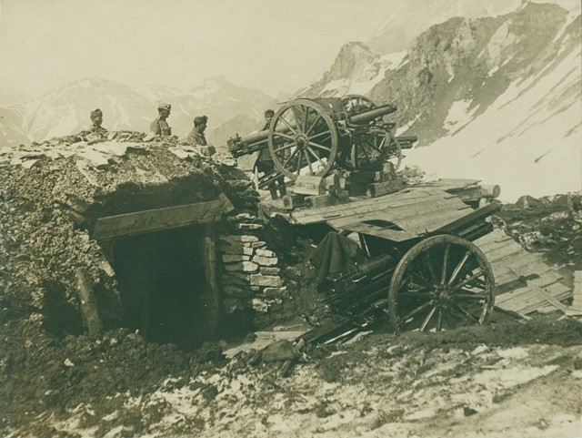 Снимка на австро-унгарска планинска батарея в областта Западна Мармолата във Високите Алпи през Първата световна война.